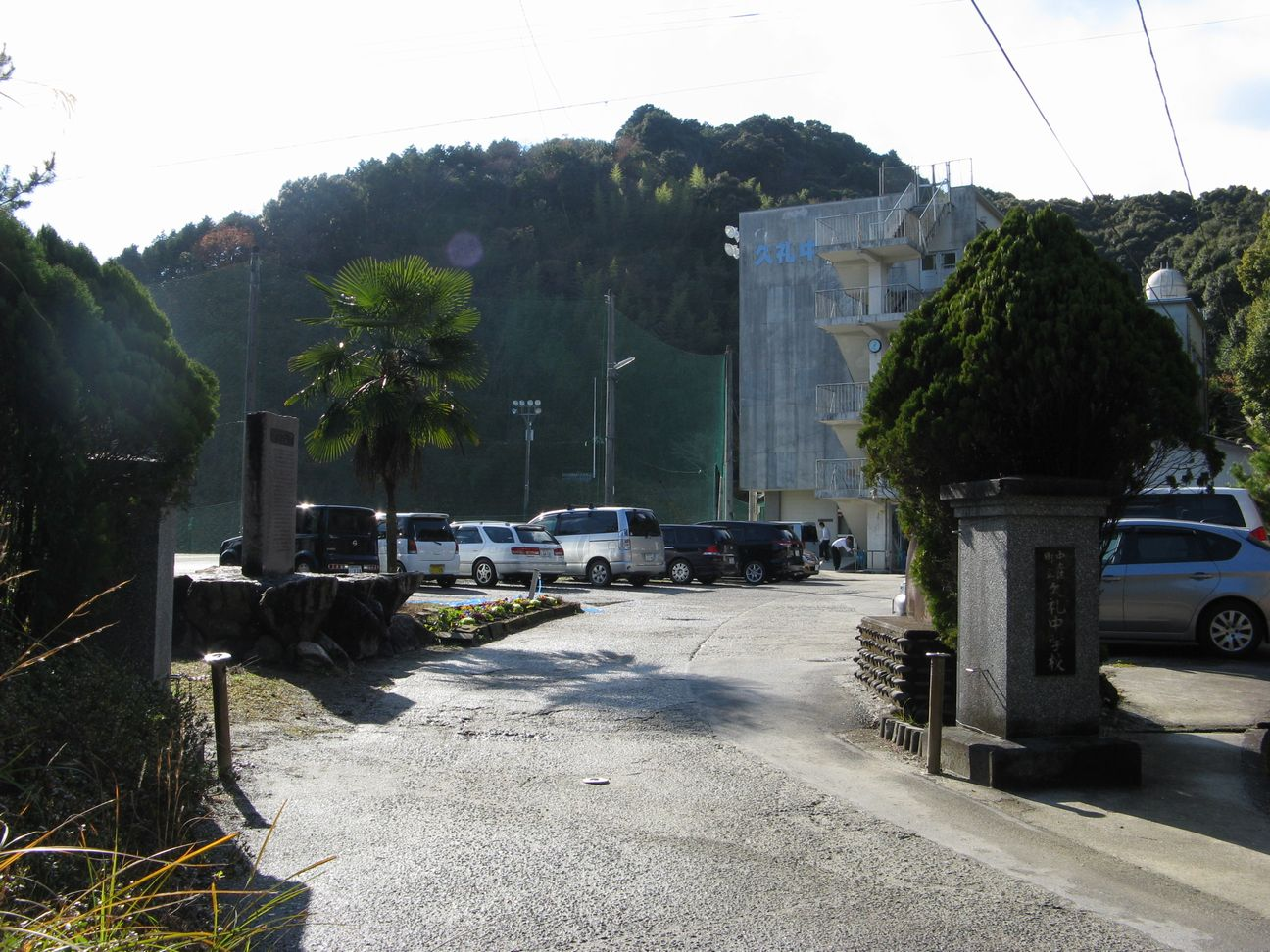 中土佐町立久礼中学校